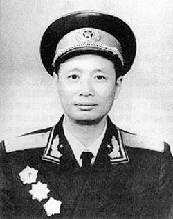 1955年张震被授予中将军衔